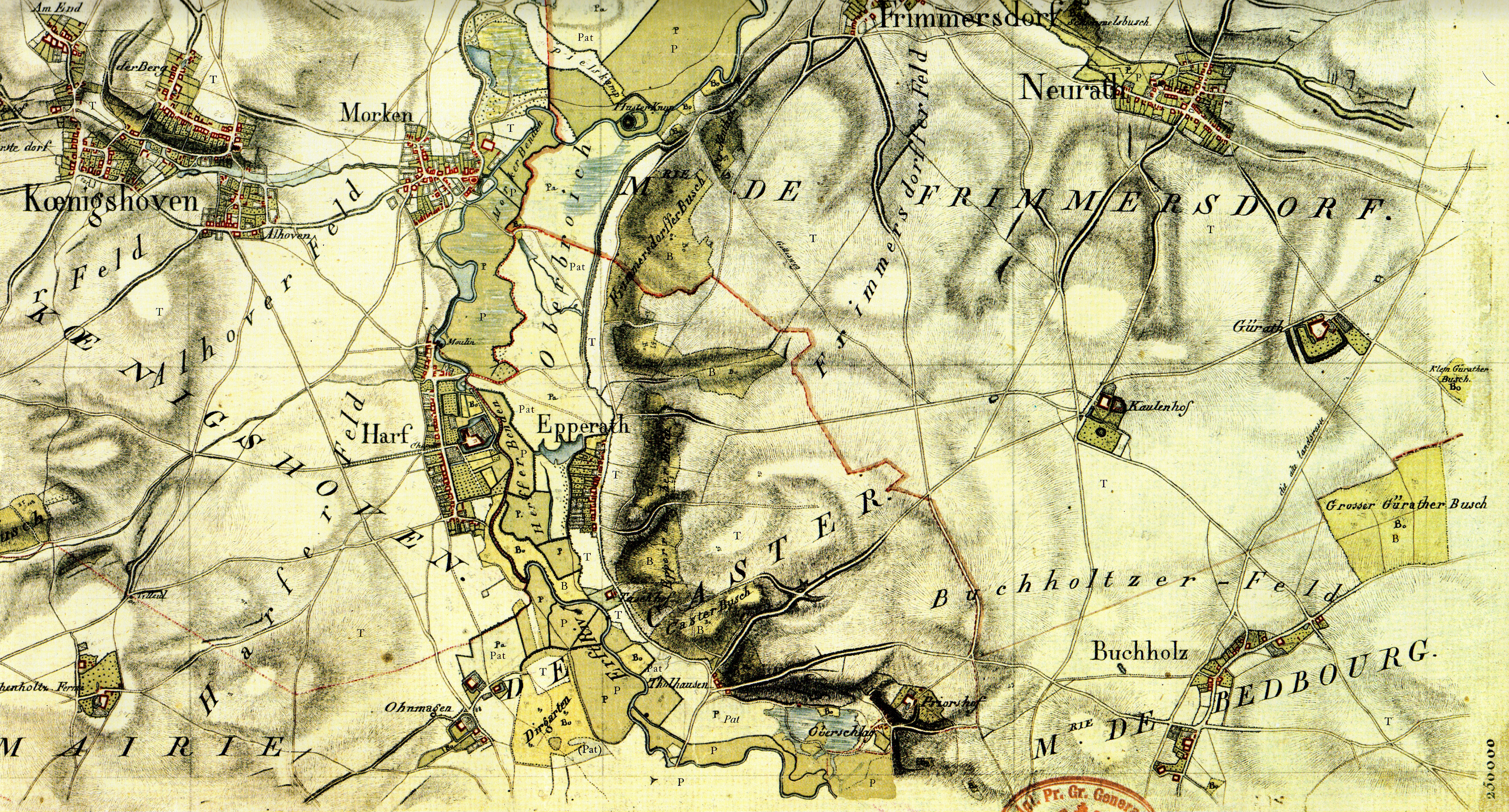 Kartenaufnahme der Rheinlande durch Tranchot und von Müffling